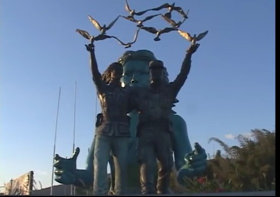 Monumento De La Concilacion. En San Salvador